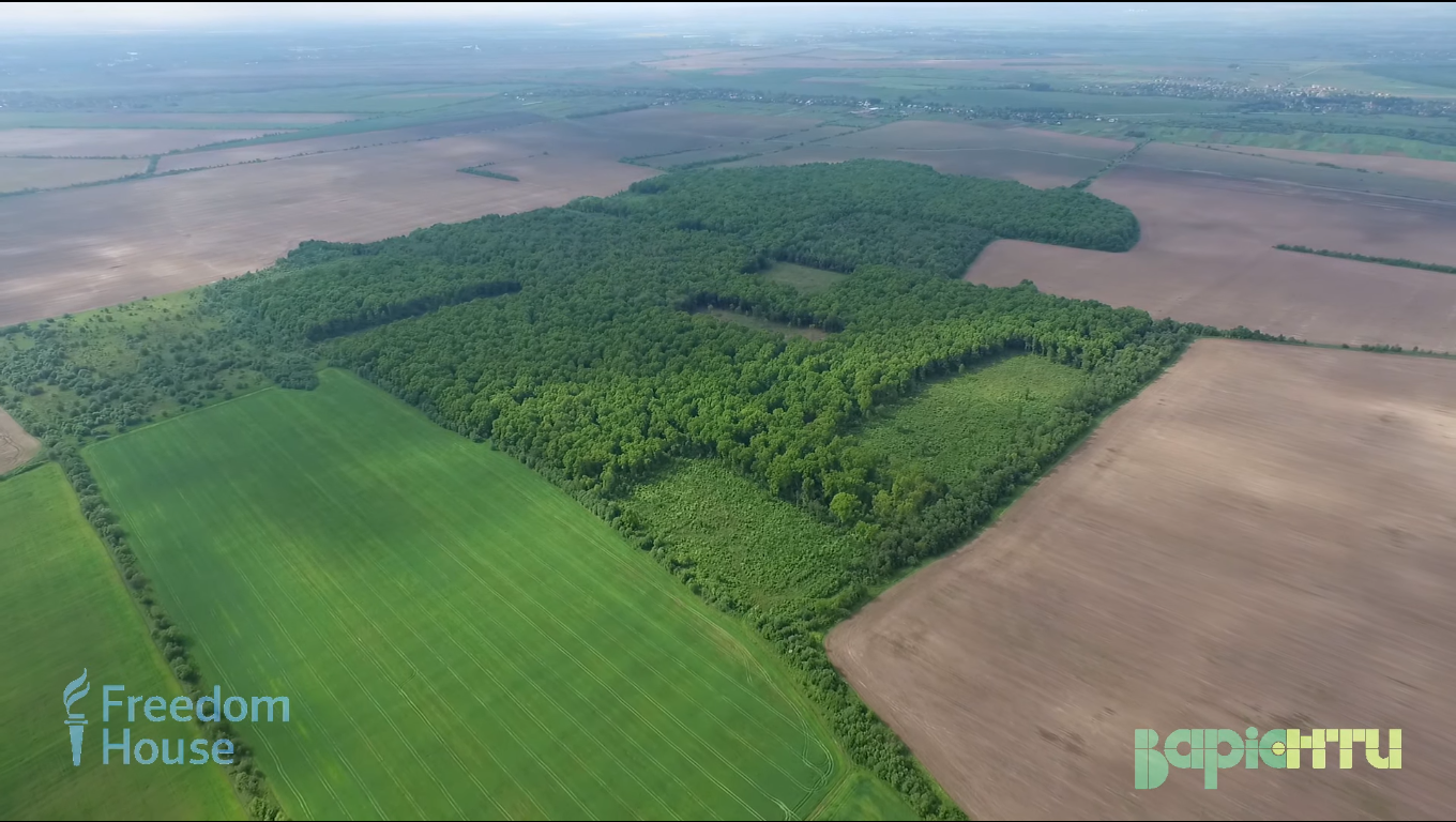 фото із сторони лісу